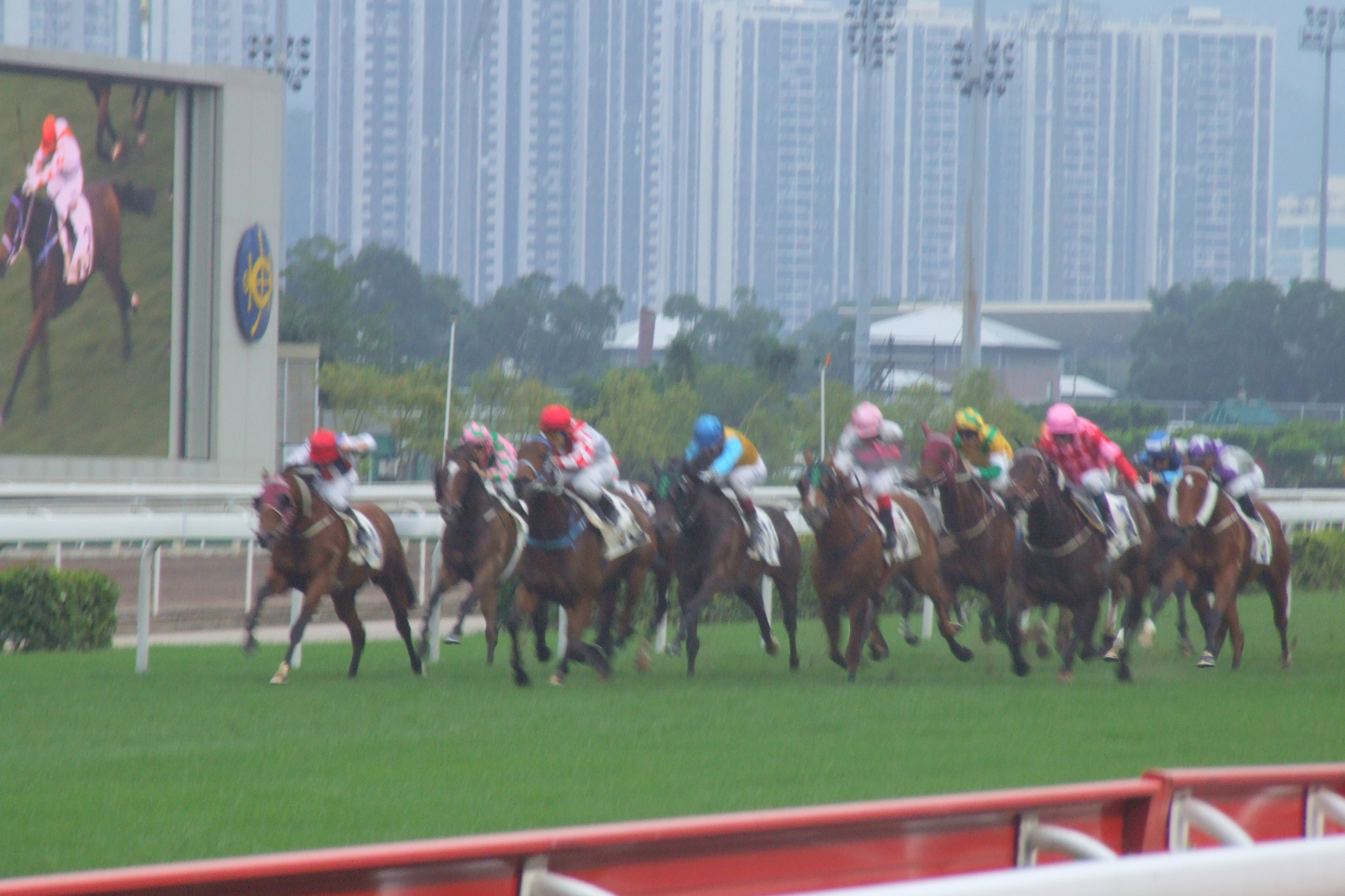 中文（香港）: 2012年馬會短途錦標